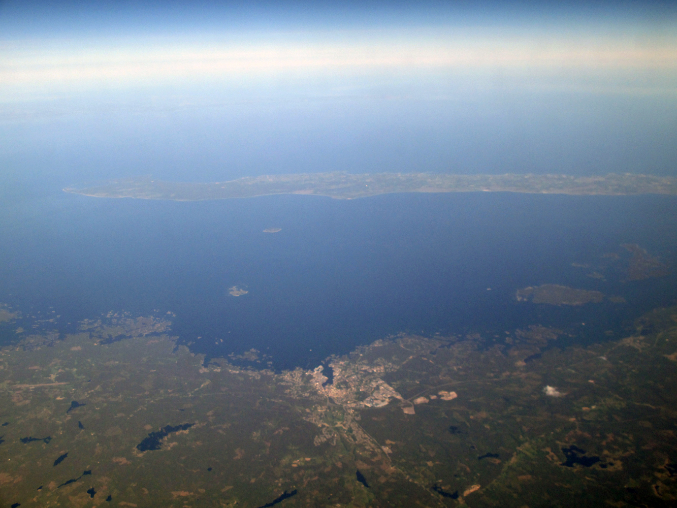 Kalmarsund, Schweden